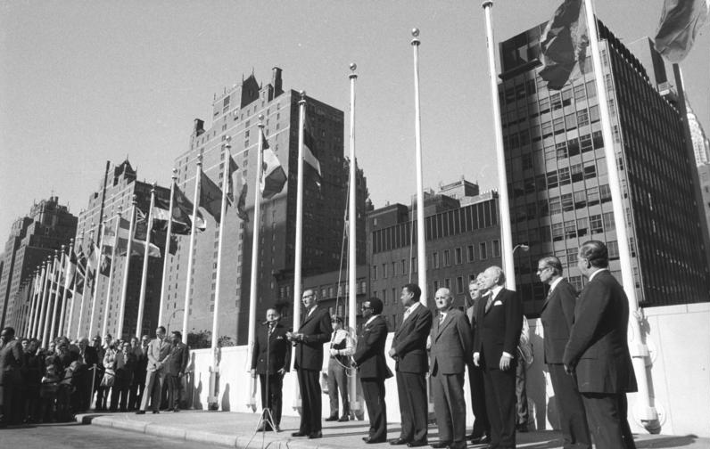 ADN-ZB/Spremberg, 25.9.1973, USA, New York: DDR-Flaggen vor dem UNO-Hauptquartier gehißt Am Tage der Eröffnung der XXXVIII. Tagung der UNO-Vollversammlung, am 18. September 1973, war die Deutsche Demokratische Republik auf einstimmigen Beschluß des Weltforums als Mitglied in die UNO aufgenommen worden. In einem feierlichen Zeremoniell wurden am darauffolgenden Tage die Staatsflagge der DDR sowie die Flaggen der ebenfalls neu in die UNO aufgenommenen Länder BRD und Bahamas vor dem Hauptquartier der Vereinten Nationen gehißt. In einer kurzen Ansprache würdigte UNO-Generalsekretär Dr. Kurt Waldheim (Bildmitte, Brille, vor Mikrophon) die Bedeutung der Aufnahme der neuen Mitglieder für die Weltorganisation. Links neben Waldheim der neugewählte Präsident der UNO-Vollversammlung Leopoldo Bernites, rechts von Waldheim die Vertreter der Bahamas, dann (als 3. neben Waldheim) DDR-Außenmininster Otto Winzer, neben ihm wiederum BRD-Außenminister Walter Scheel.